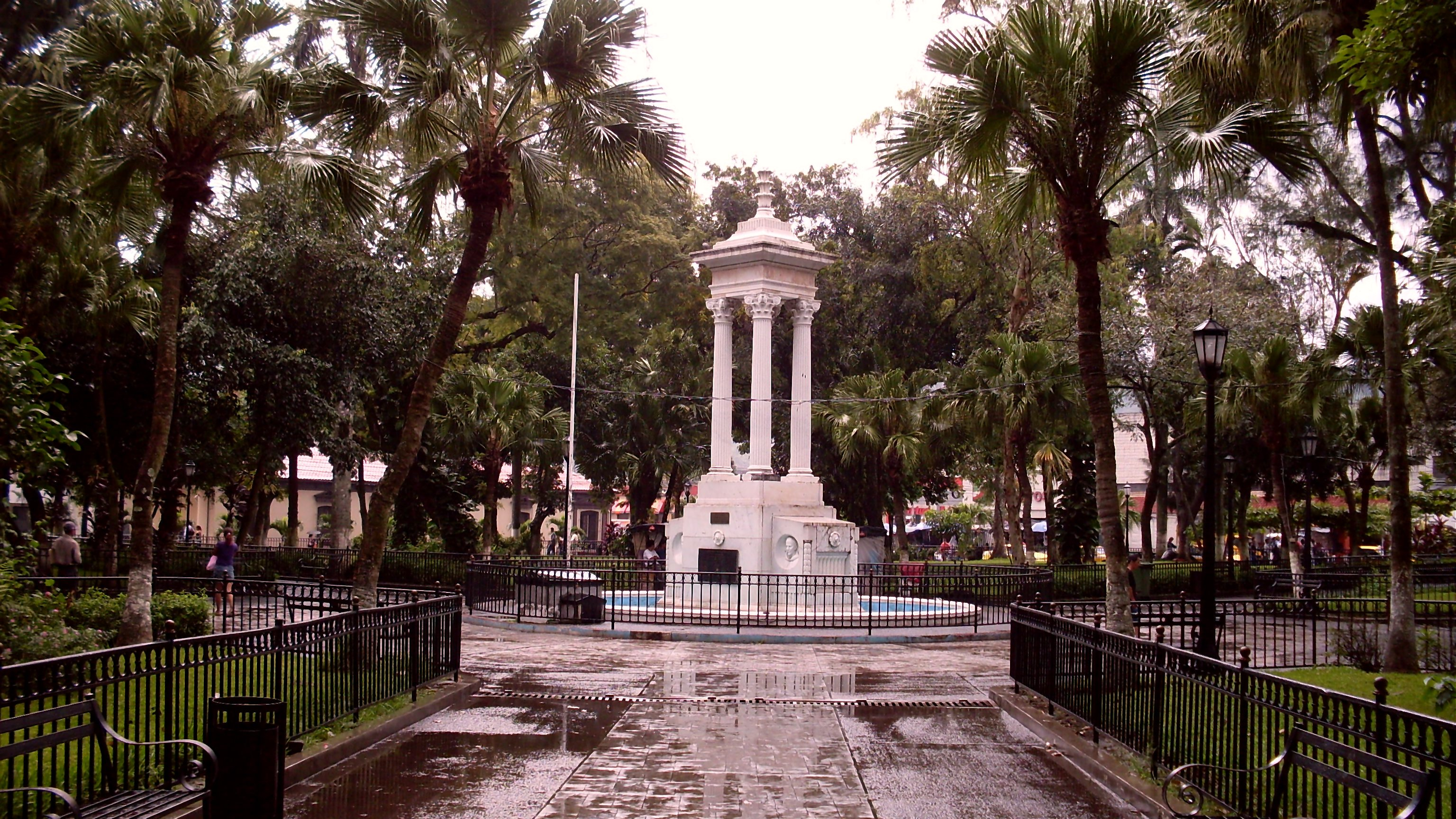 Parque José María San Martín in Santa Tecla, El Salvador, C.A.